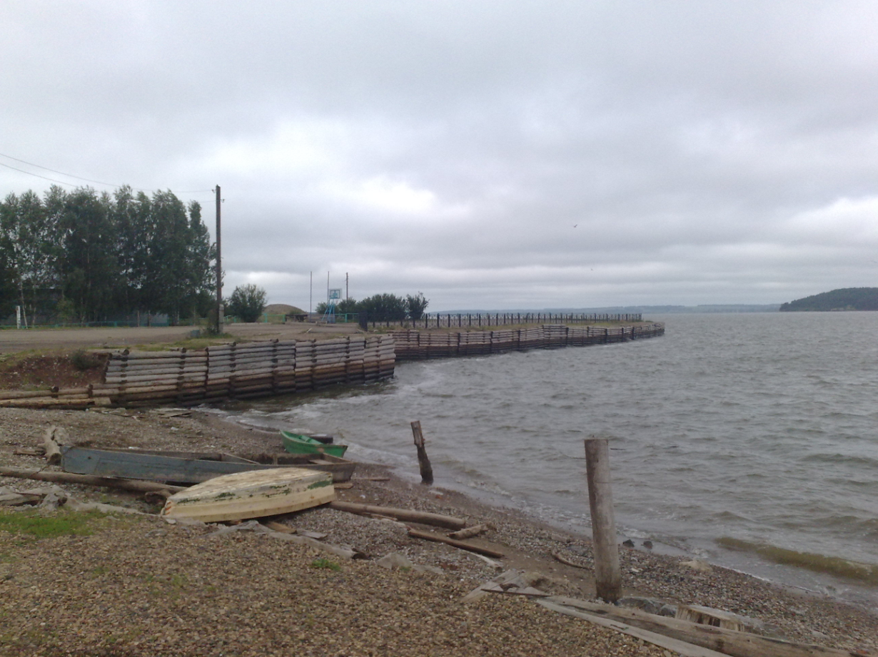 Вид на Камское водохранилища с набережной пос. Ильинский (Пермский край)